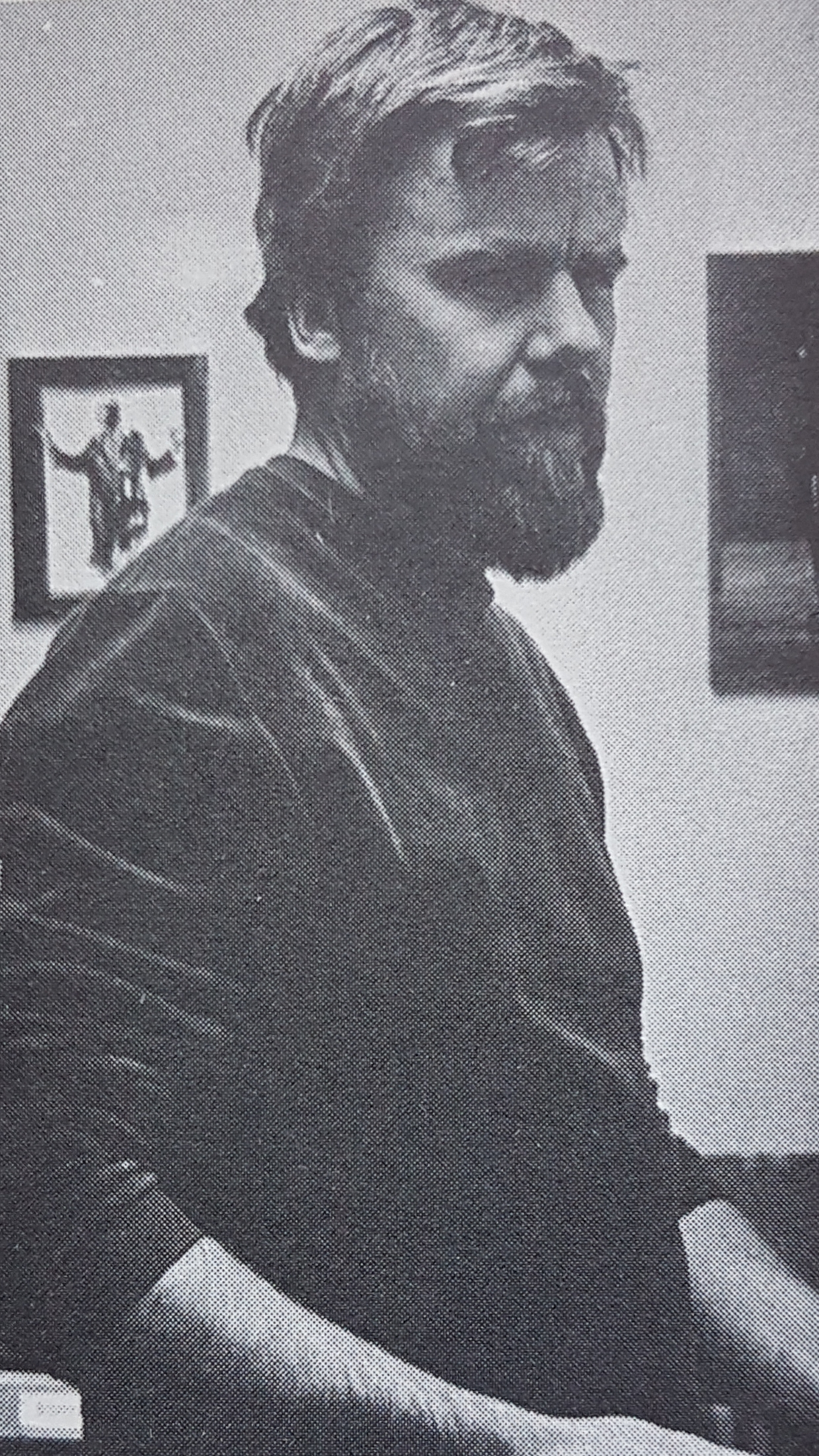 Ingemar Lööf Artist.from Sweden